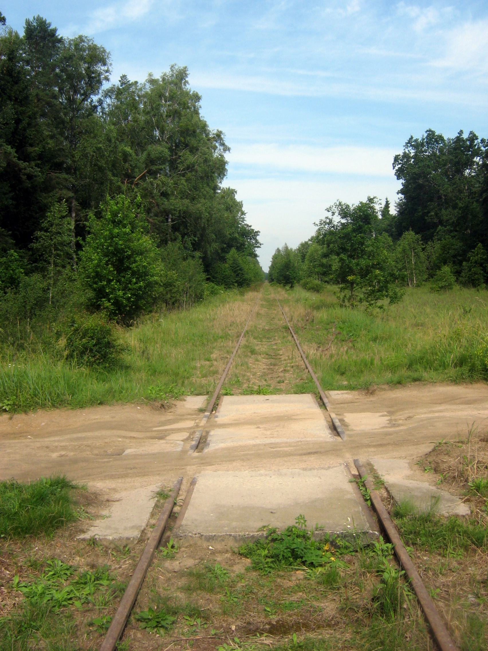 Linia kolejowa nr 52 w Czerlonce